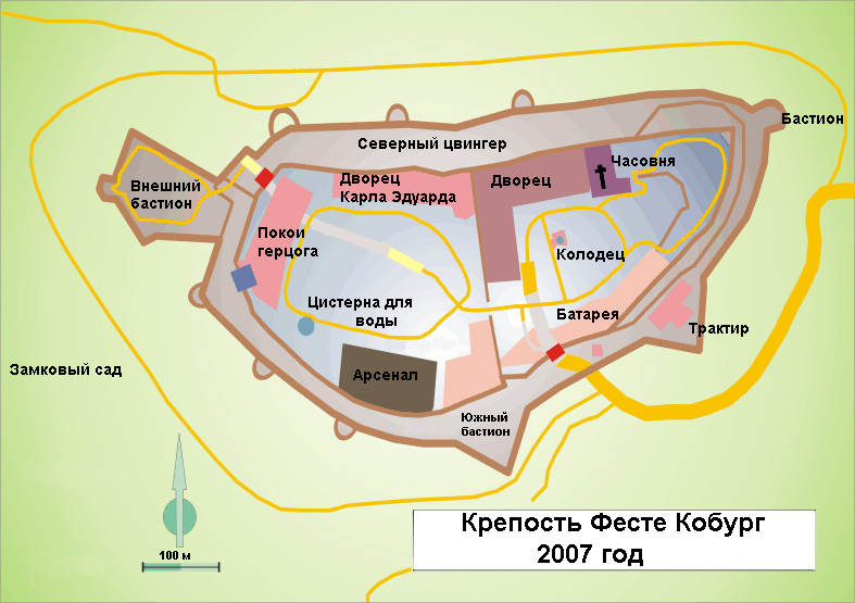 Veste Coburg (Germany): Pläne der Burg 1250, 1560, 1625 und 2007